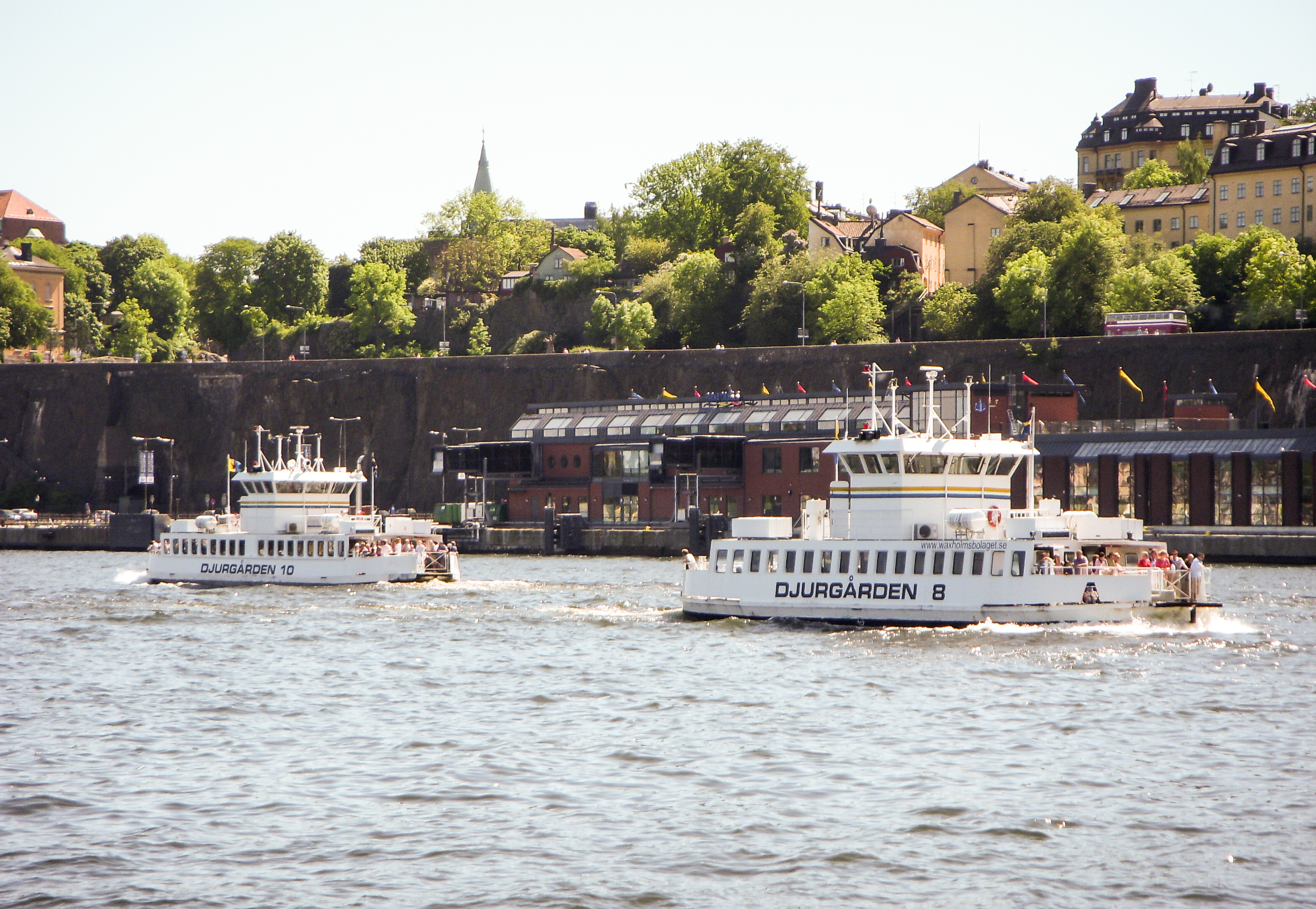 Djurgårdsfärjan "Djurgården 8" och "Djurgården 10" i Stockholm